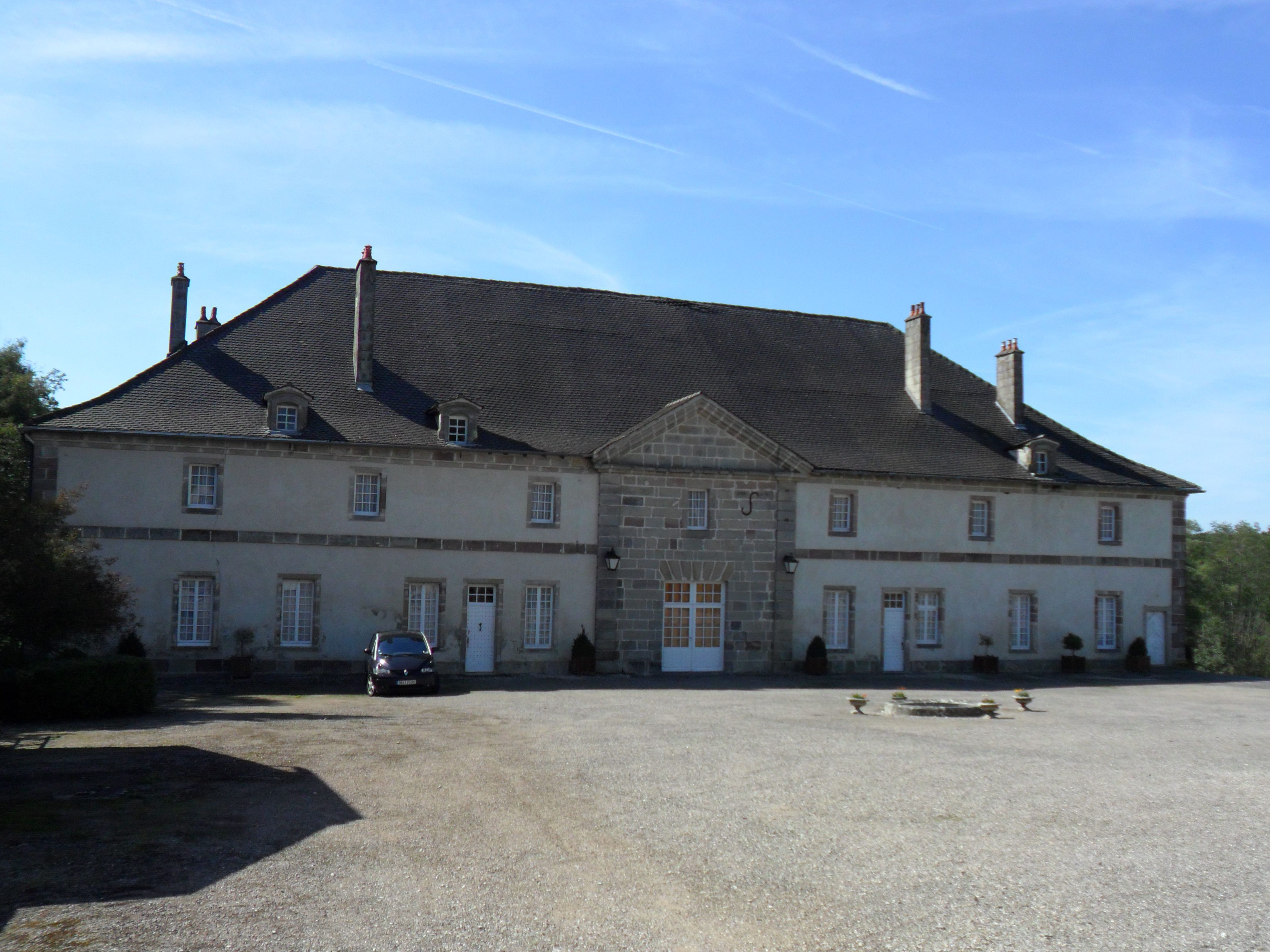 Château et son pigeonnier de Thuillières This building is en partie classé, en partie inscrit au titre des Monuments Historiques. .